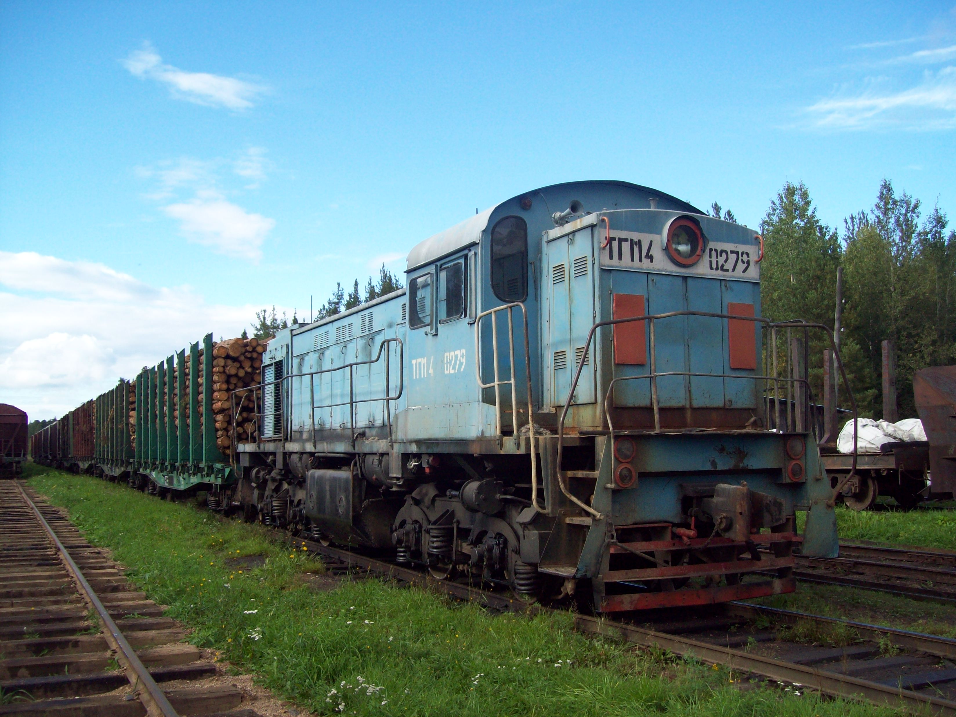 Тепловоз ТГМ4-0279 с поездом на станции Солигалич